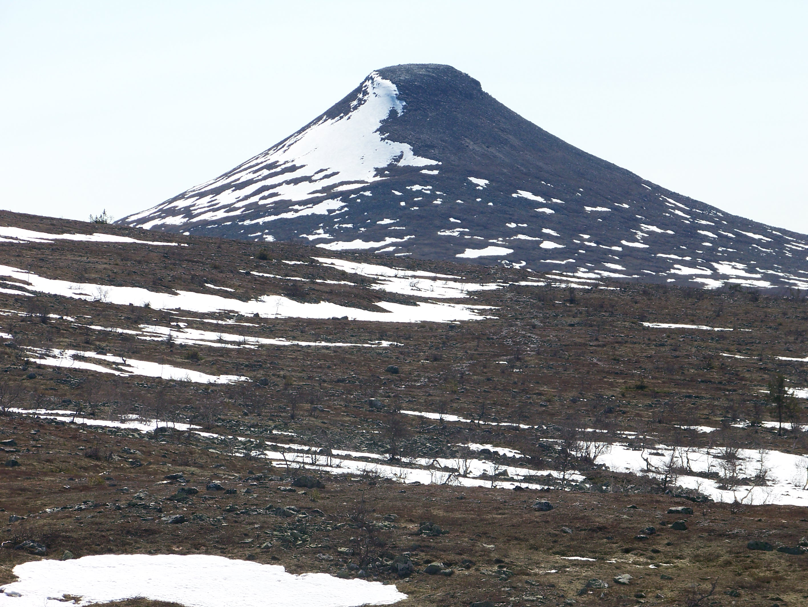 Mount Stadjan, Dalarna